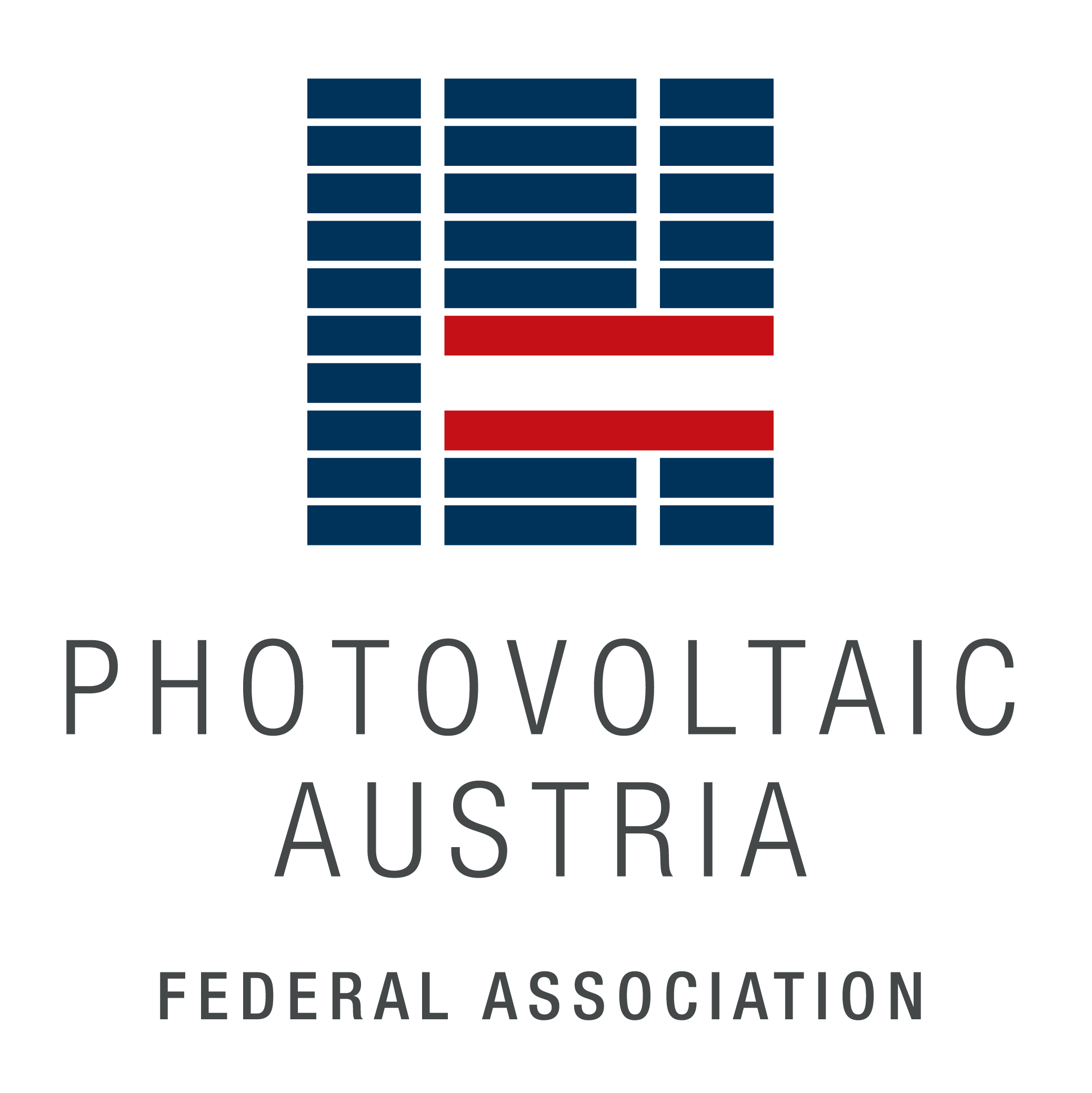 Logo der PVA